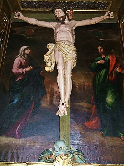 Calvario en la Iglesia parroquial de San Esteban, Arguedas, Navarra, España/Spain